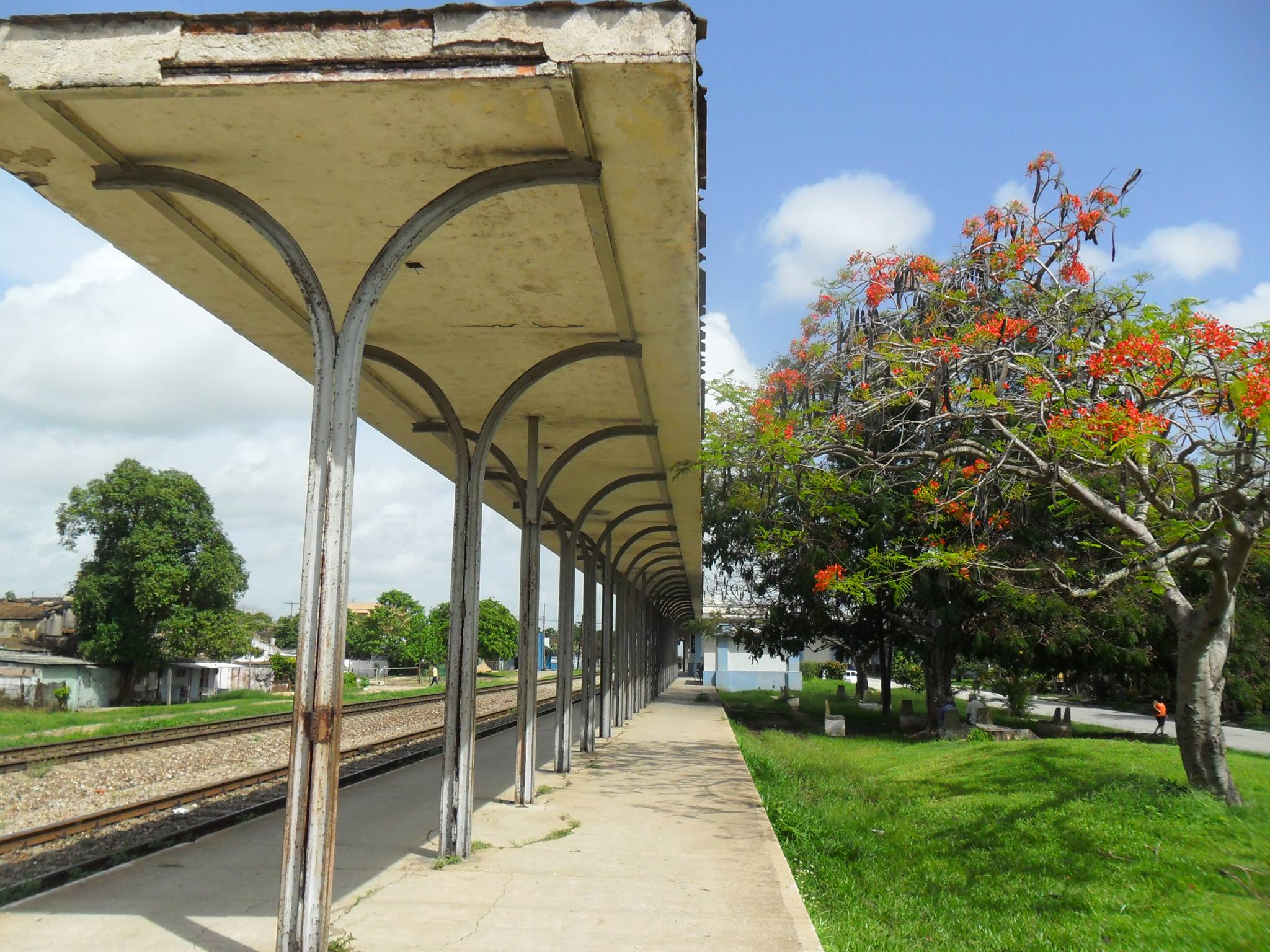 Florida, Cuba